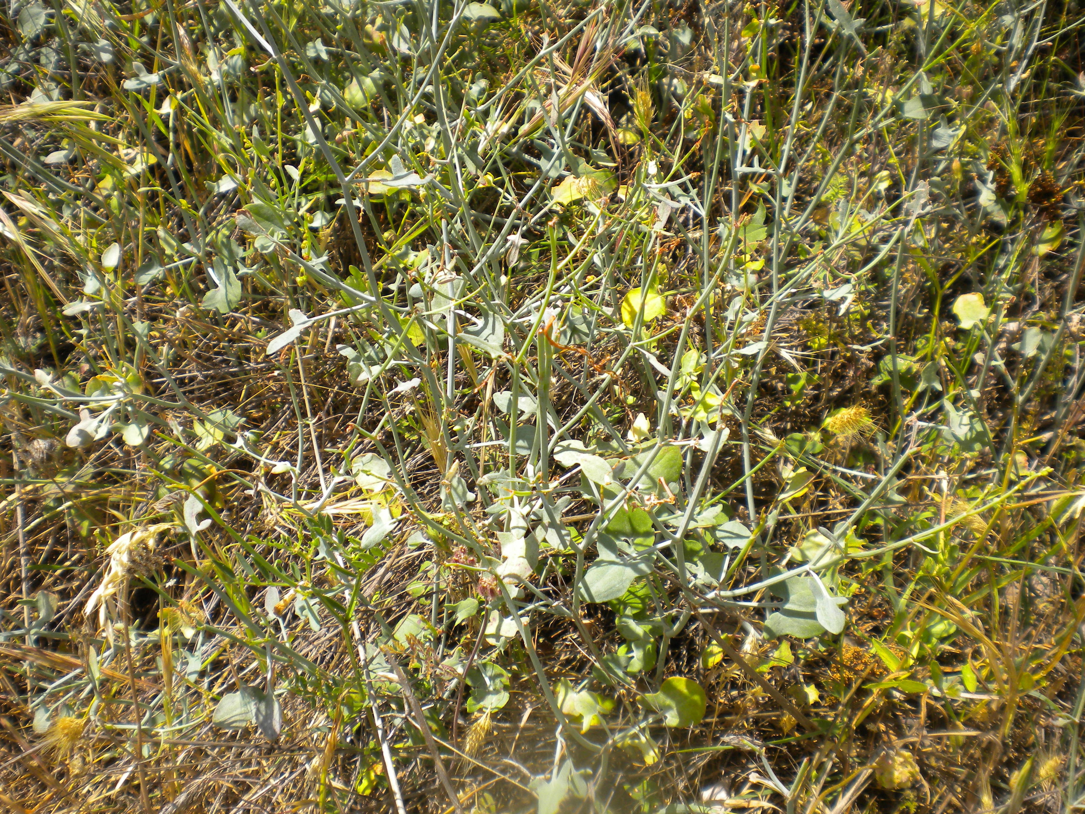 Rumex induratus.